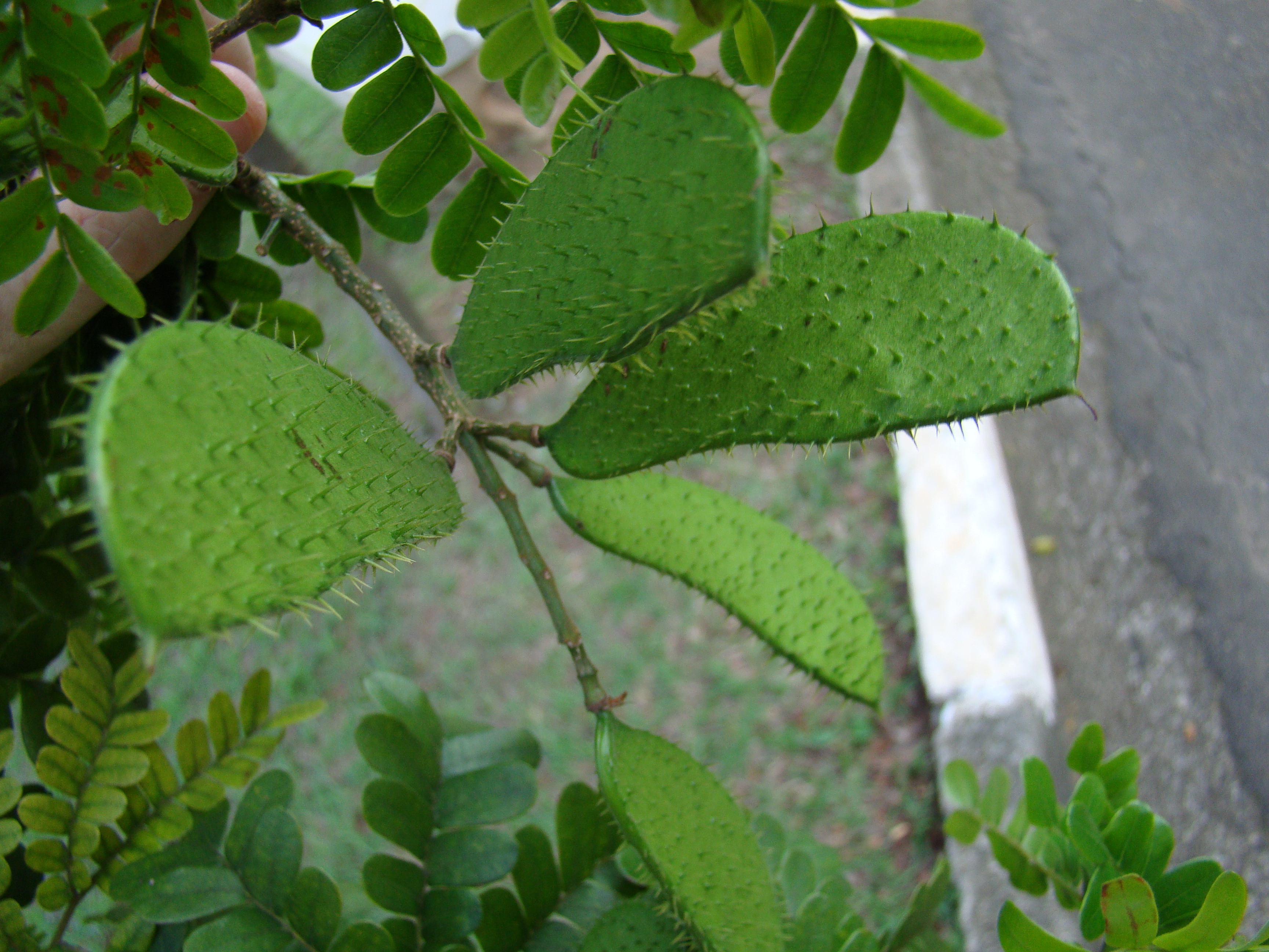 Caesalpinia echinata Ceret Sao Paulo